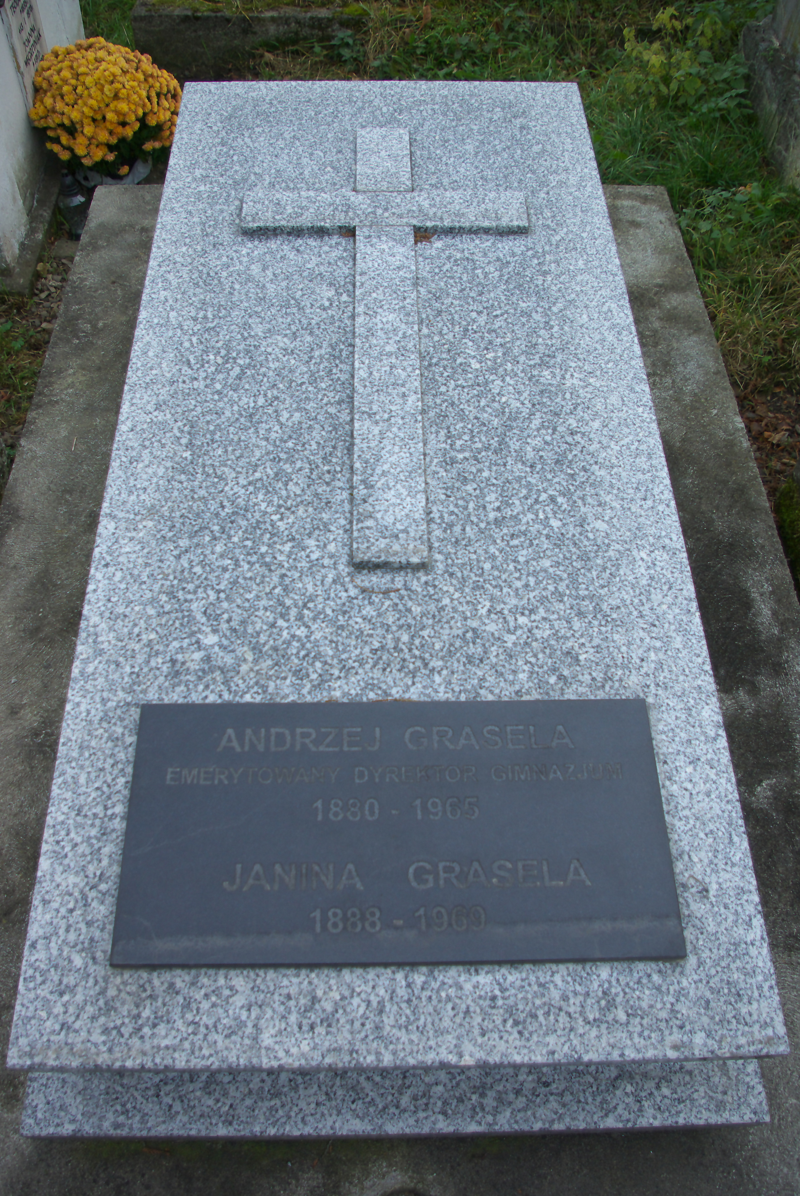 Grobowiec rodziny Andrzeja i Janiny Grasela na Cmentarzu Centralnym w Sanoku.